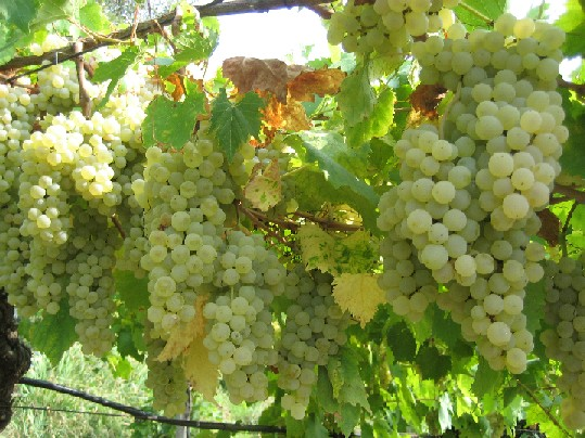 Uva Durella